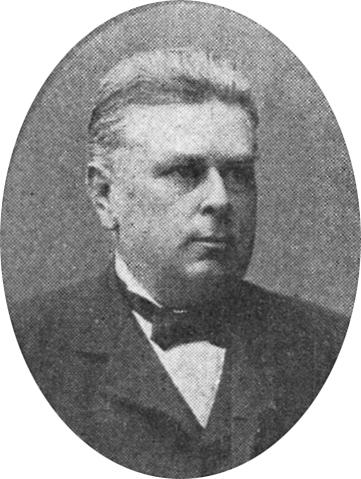 Carl Johan Fahlcrantz (1849-1915)